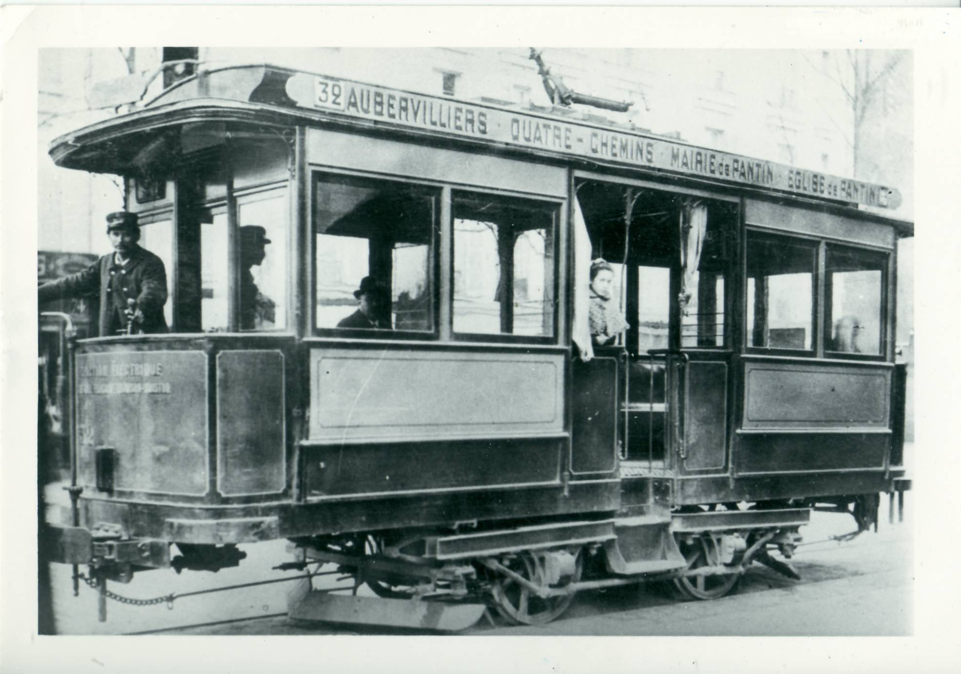 Photo ancienne : motrice de la ligne de tramway Aubervilliers - Église de Pantin